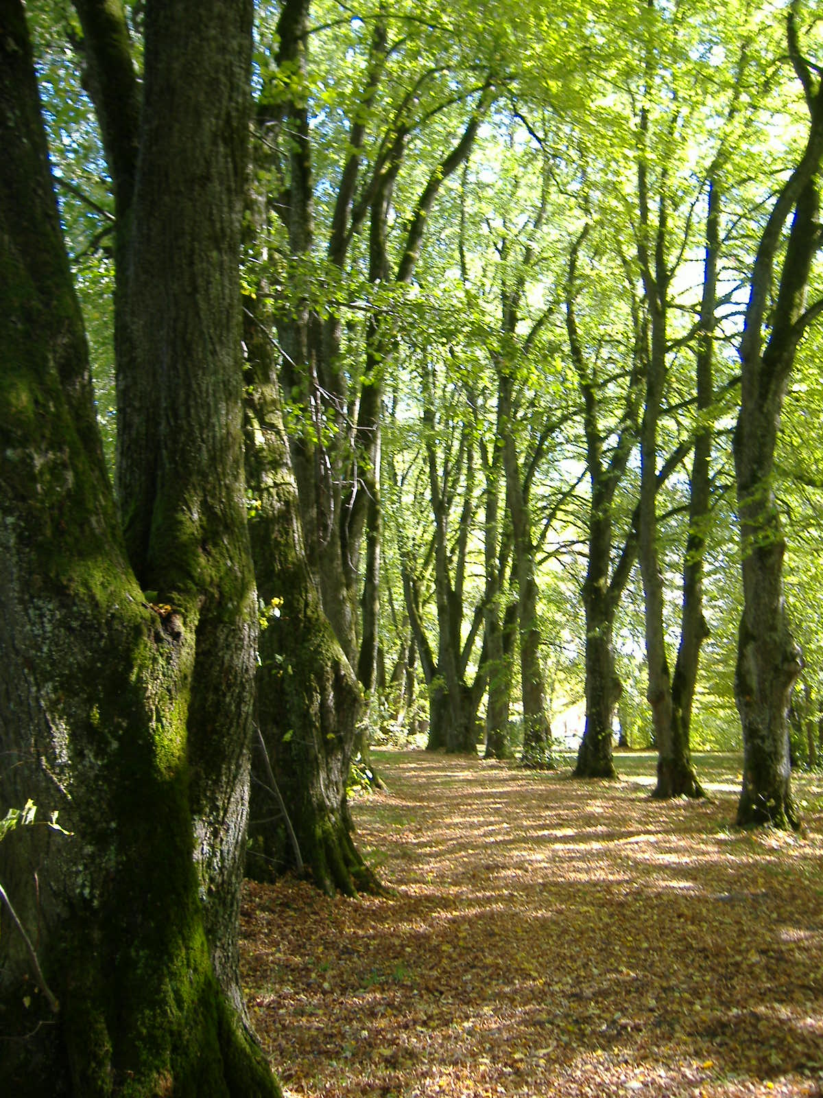 Welden